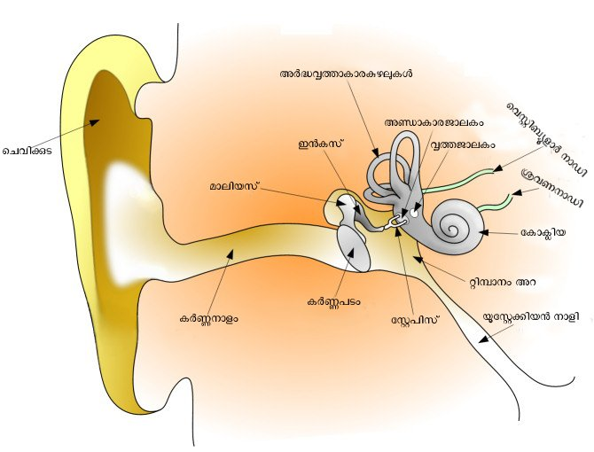 ചെവിയുടെ ഘടന